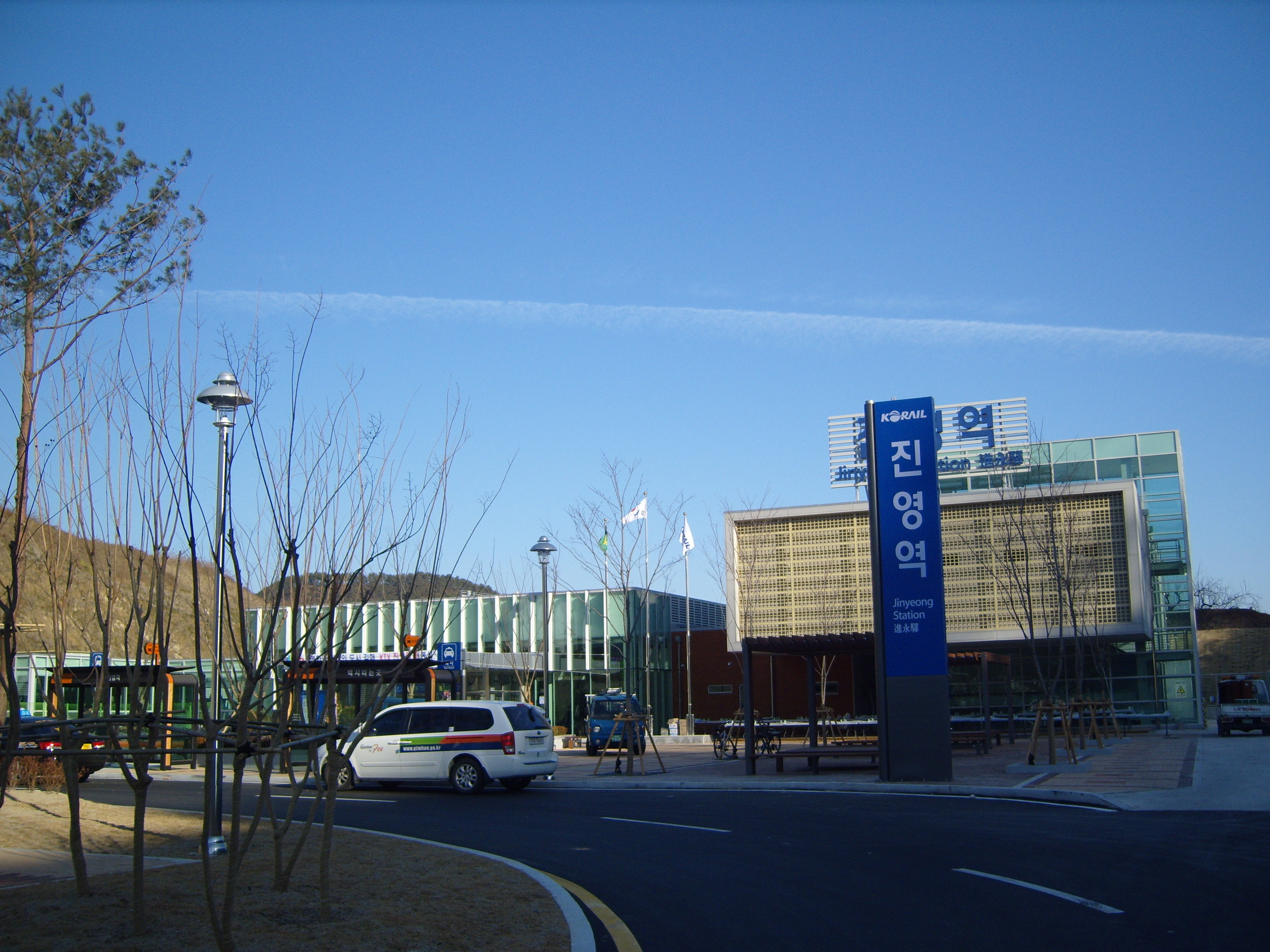 신진영역 입구